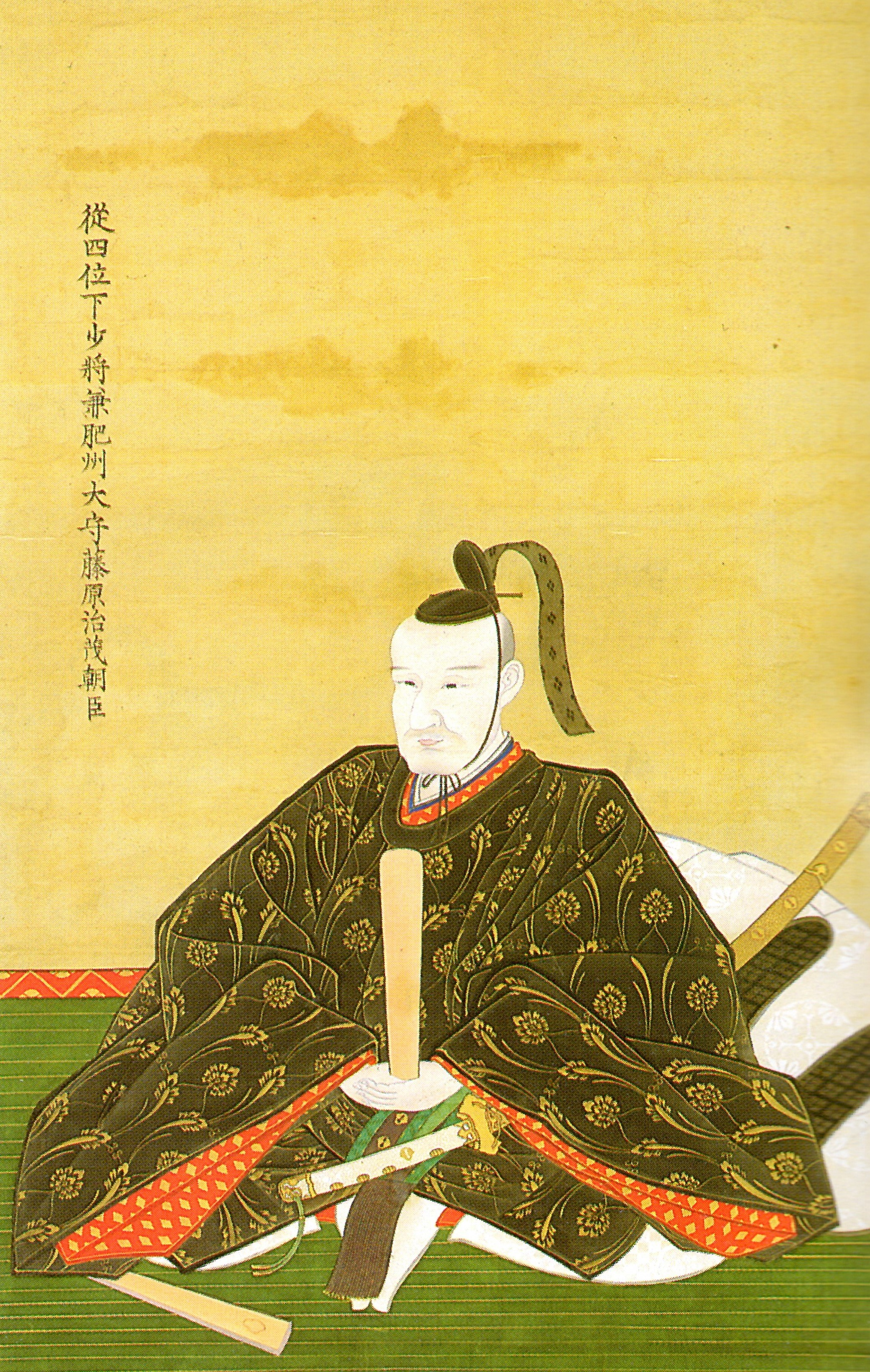 鍋島治茂の肖像。